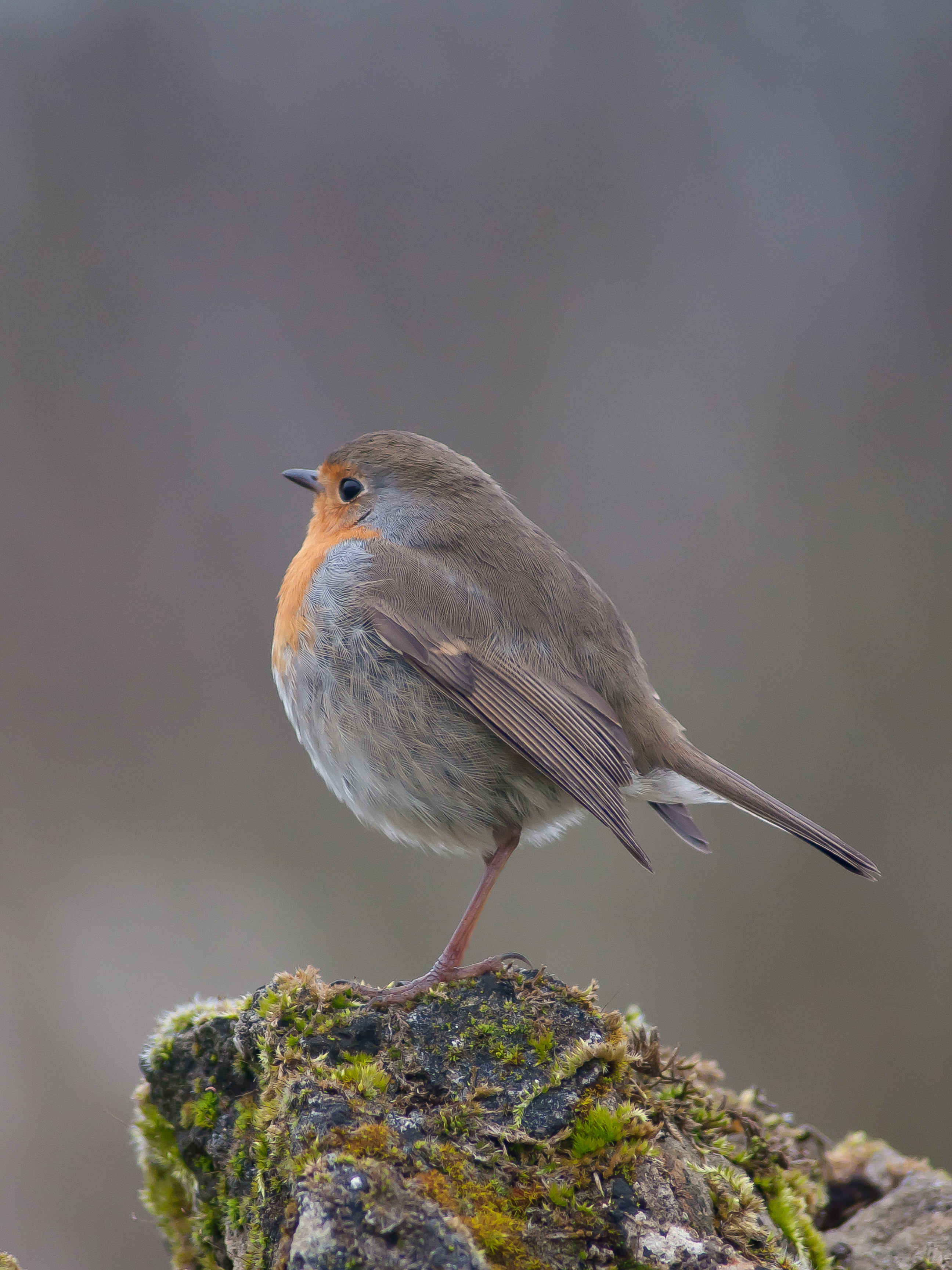 Rouge gorge.